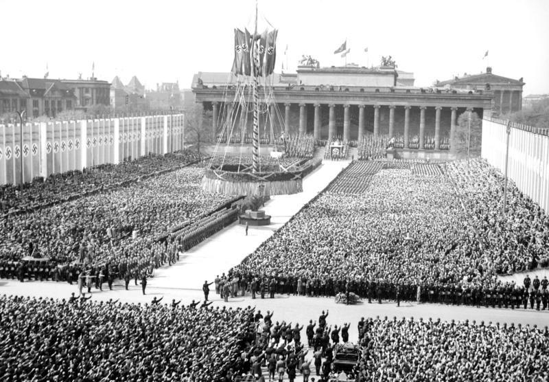 Berlin Kundgebung zum 1. Mai 1936 am alten Museum im Lustgarten